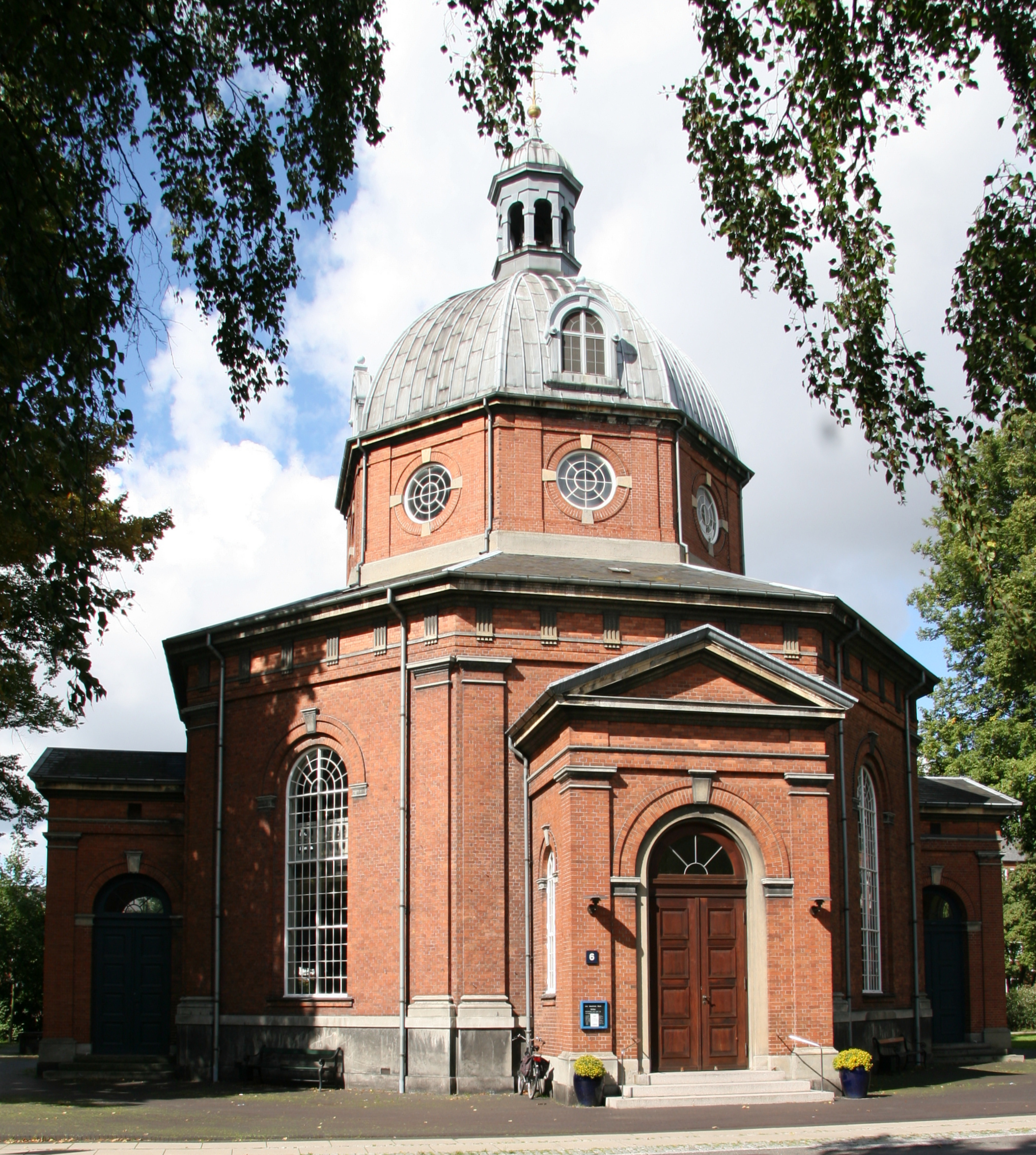 De Gamles Bys Kirke in Copenhagen, Denmark.